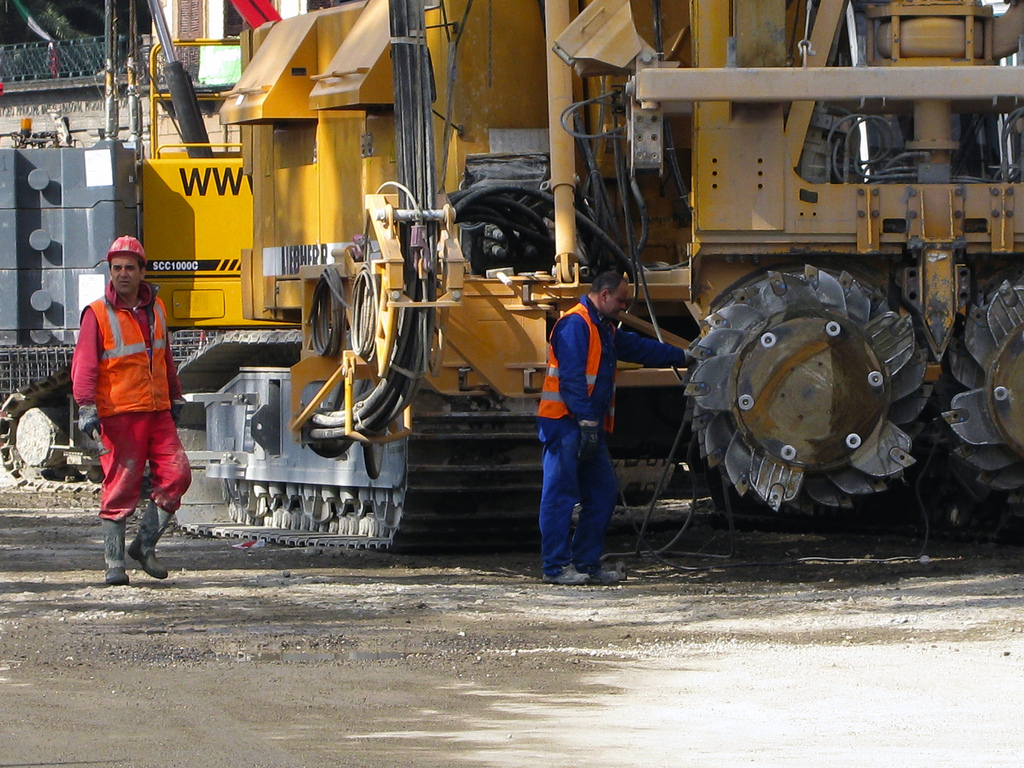 Napoli, i cantieri per il prolungamento della linea 6 della metropolitana, nel quartiere di Chiaia.